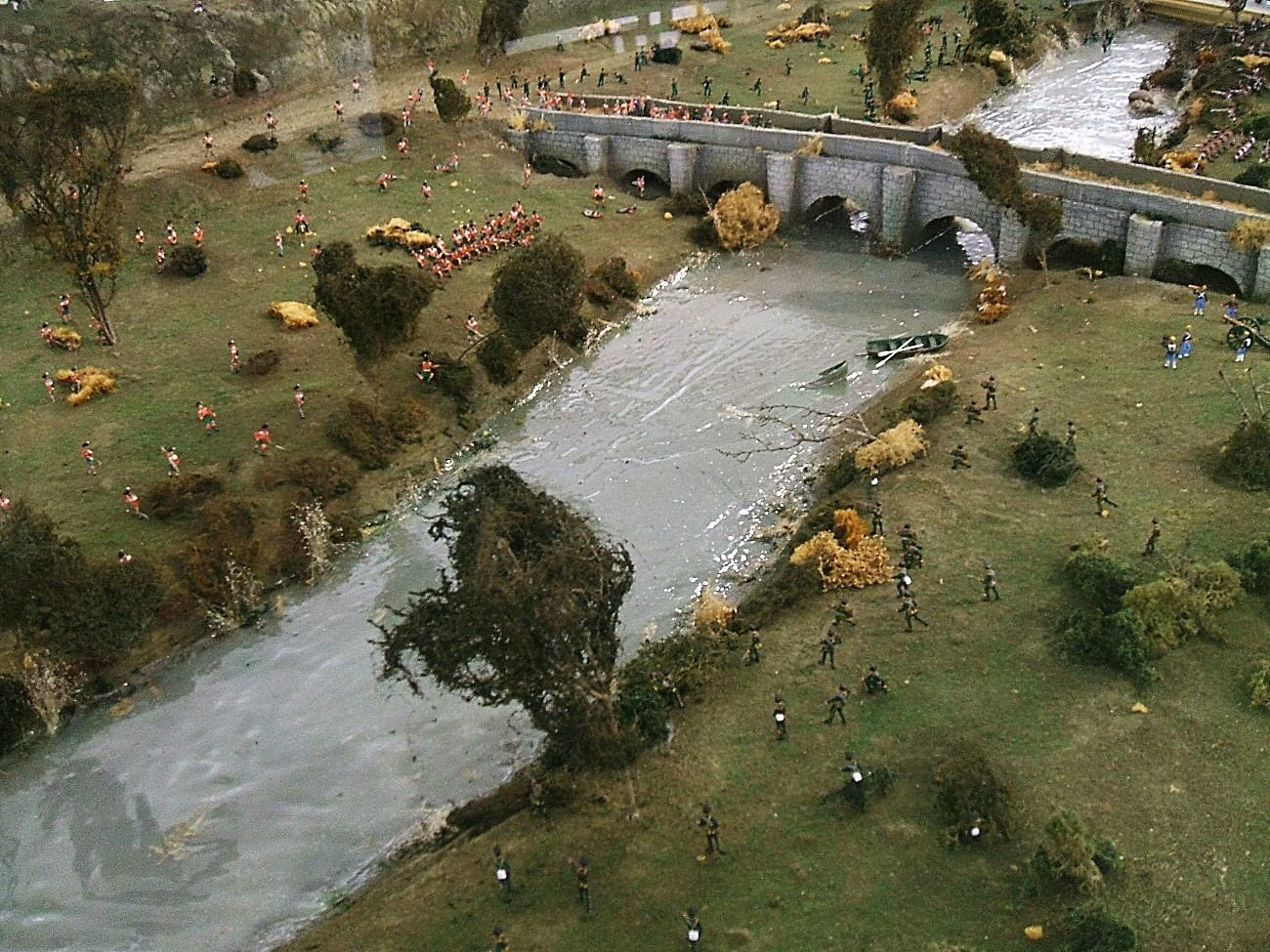 Museo de Armería de Álava, Vitoria-Gasteiz, País Vasco, España. La maqueta reproduce el enfrentamiento de las tropas aliadas y francesas por la posesión del puente Momario sobre el Zadorra, a la altura de Mendoza, en el curso de la Batalla de Vitoria, el 21 de junio de 1813.